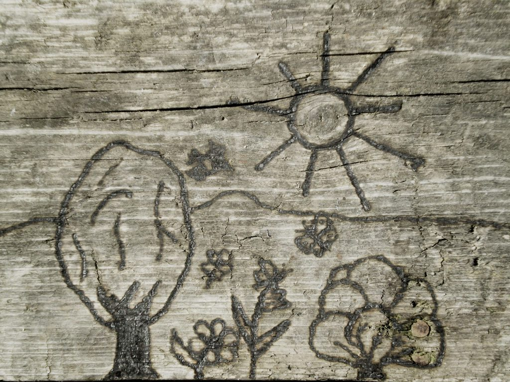 Пирограмма, выполненная с помощью линзы